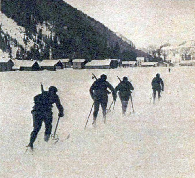 La patrouille militaire française de ski alpin, troisième des JO de 1924 à Chamonix.